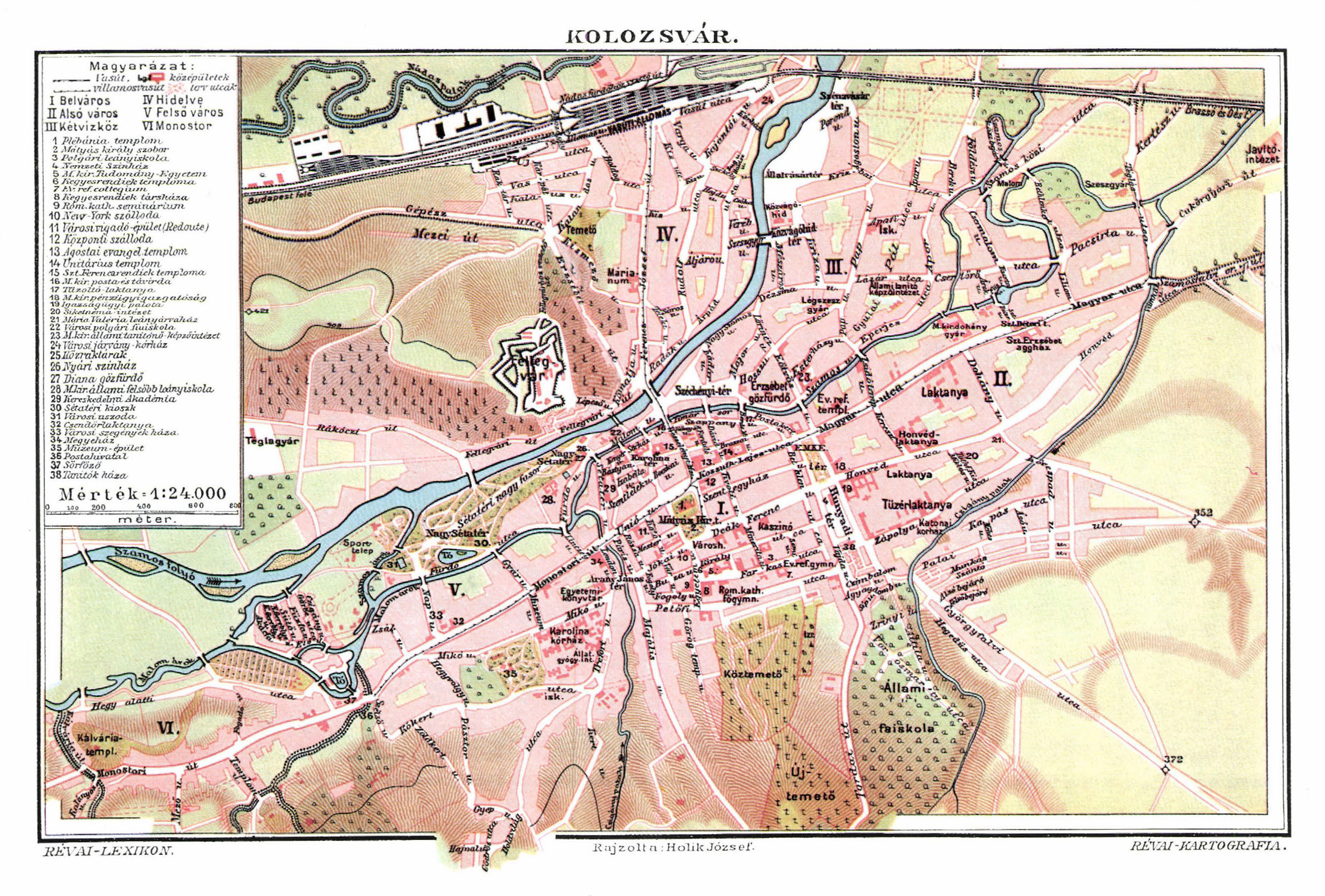 Révai nagy lexikona, Rajzolta: Holik József Kolozsvár város térképe, Trianon előtt